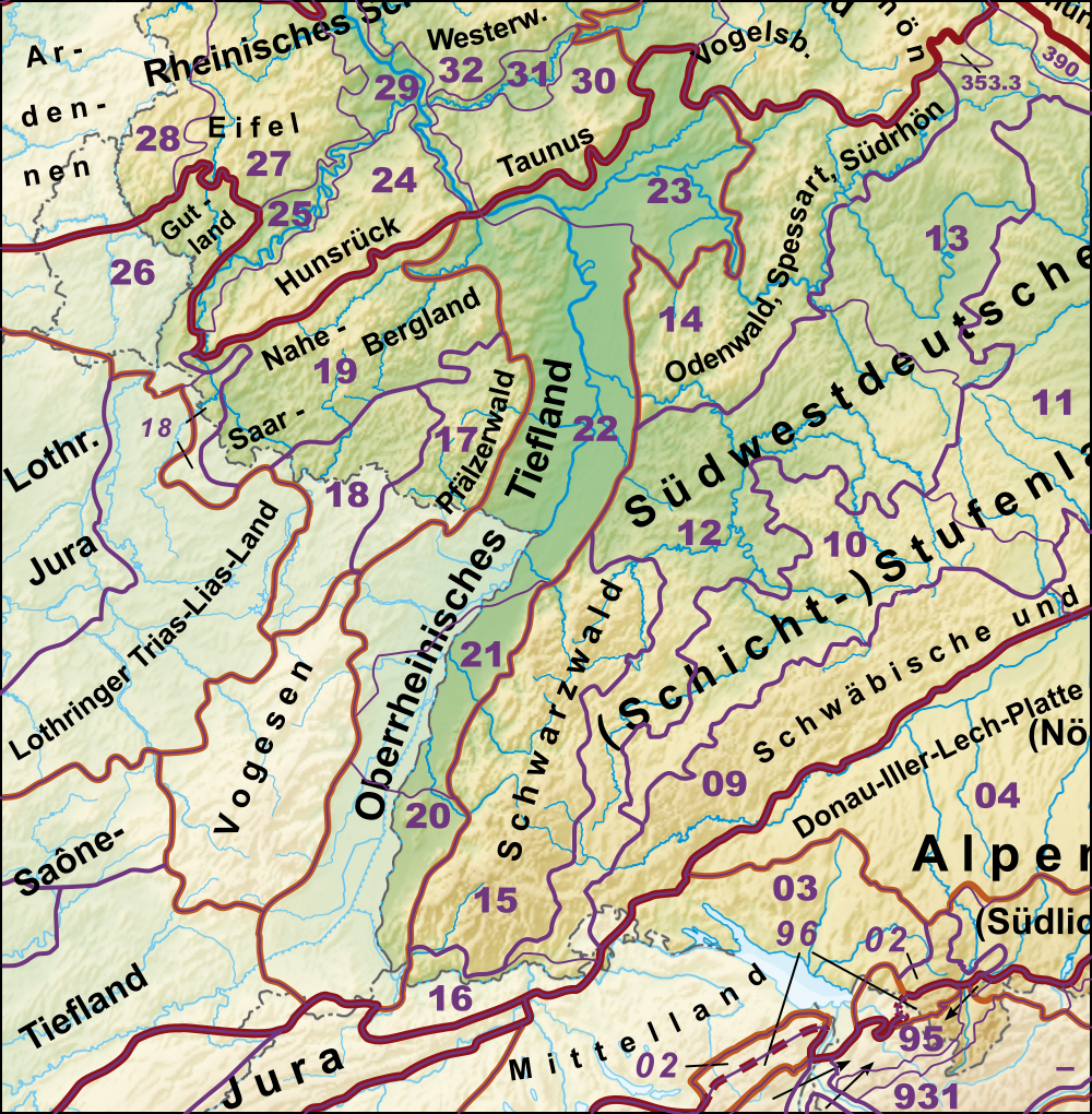 Haupteinheitengruppen insbesondere des deutschan Anteils am Nordfranzösischen Schichtstufenland